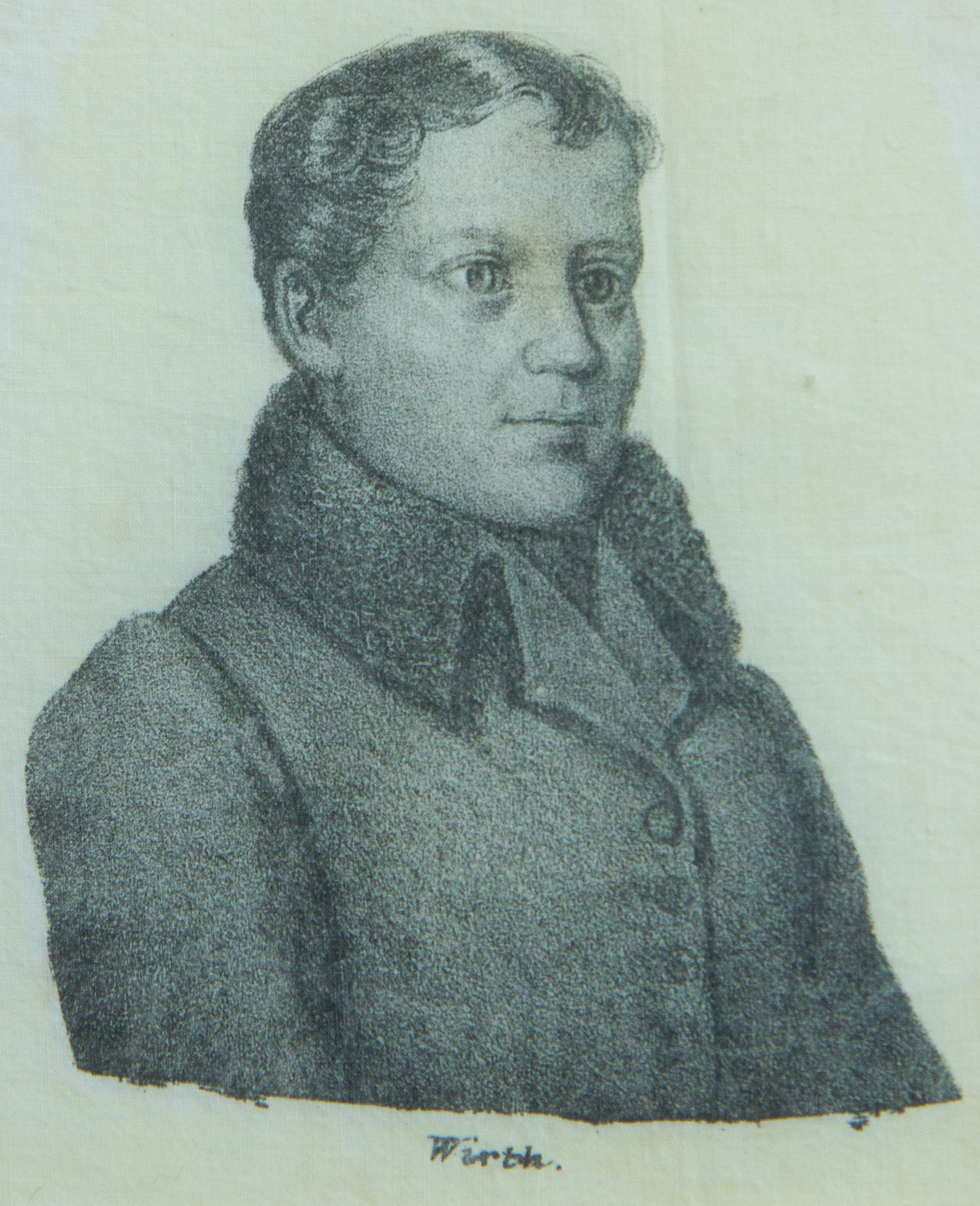 Hambacher Tuch, fotografiert im Archiv des Liberalismus in Gummersbach: Johann Georg August Wirth (1798-1848)